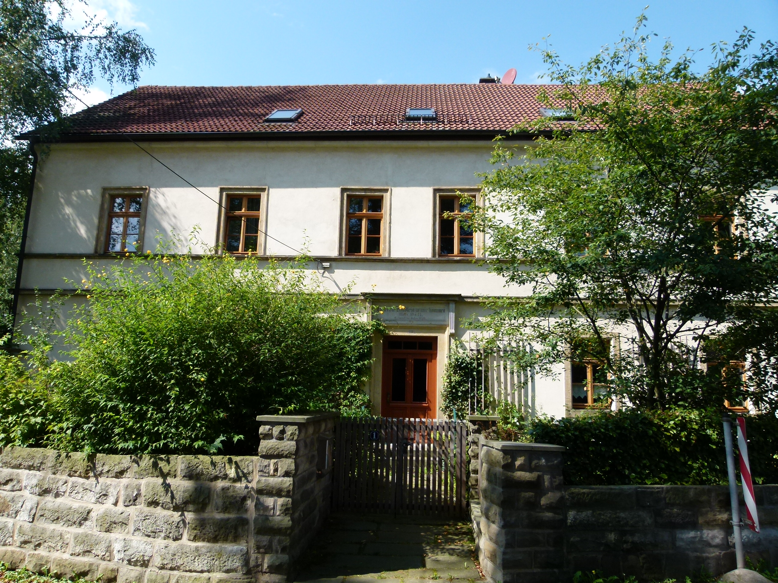 Denkmalgeschütztes Haus, Schulstraße 1, Ortsteil Dorf Wehlen, Stadt Wehlen, Sachsen